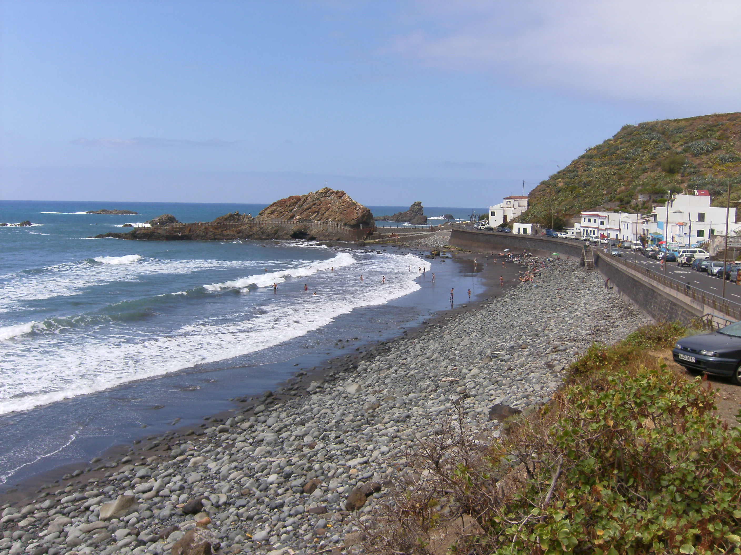 Playa del Roque de las Bodegas, en Taganana (Tenerife).